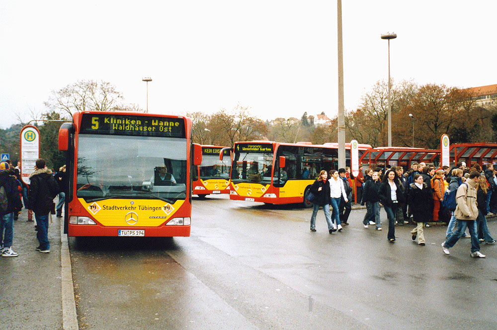 Stadtverkehr Tübingen buses at the bus station.